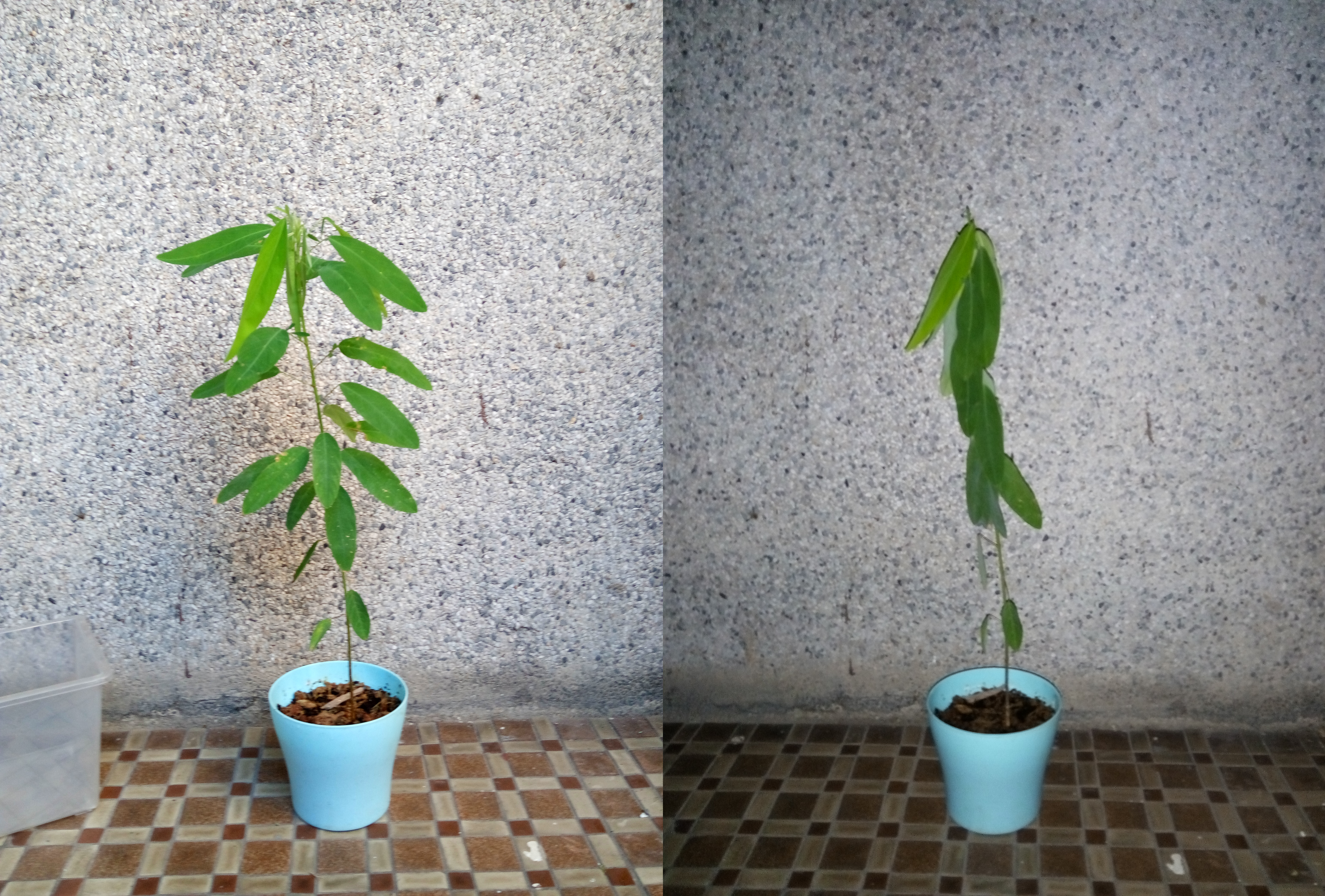 跳舞草在日间和夜间的对比。